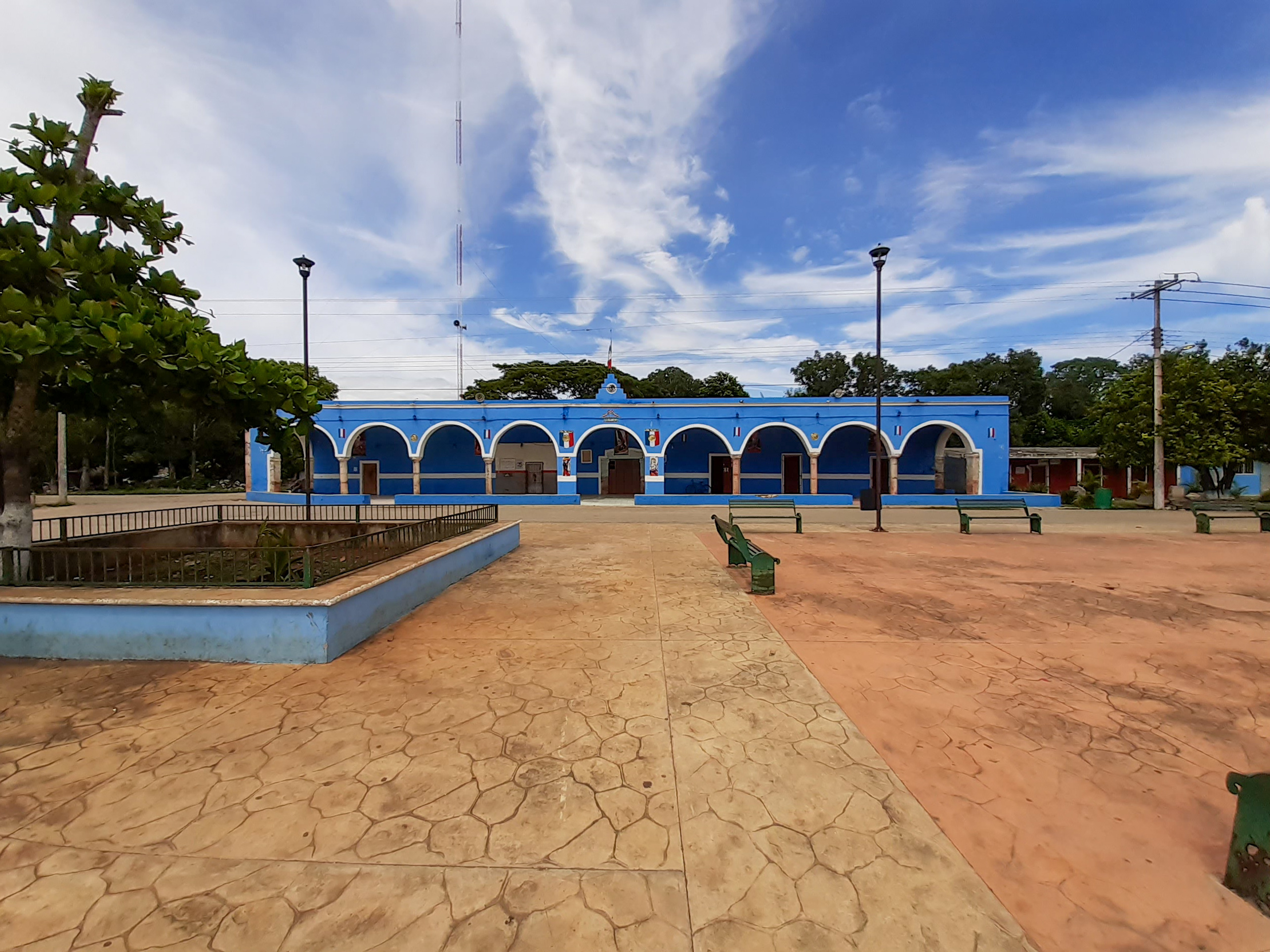 Comisaría de Tiholop, Yaxcabá.